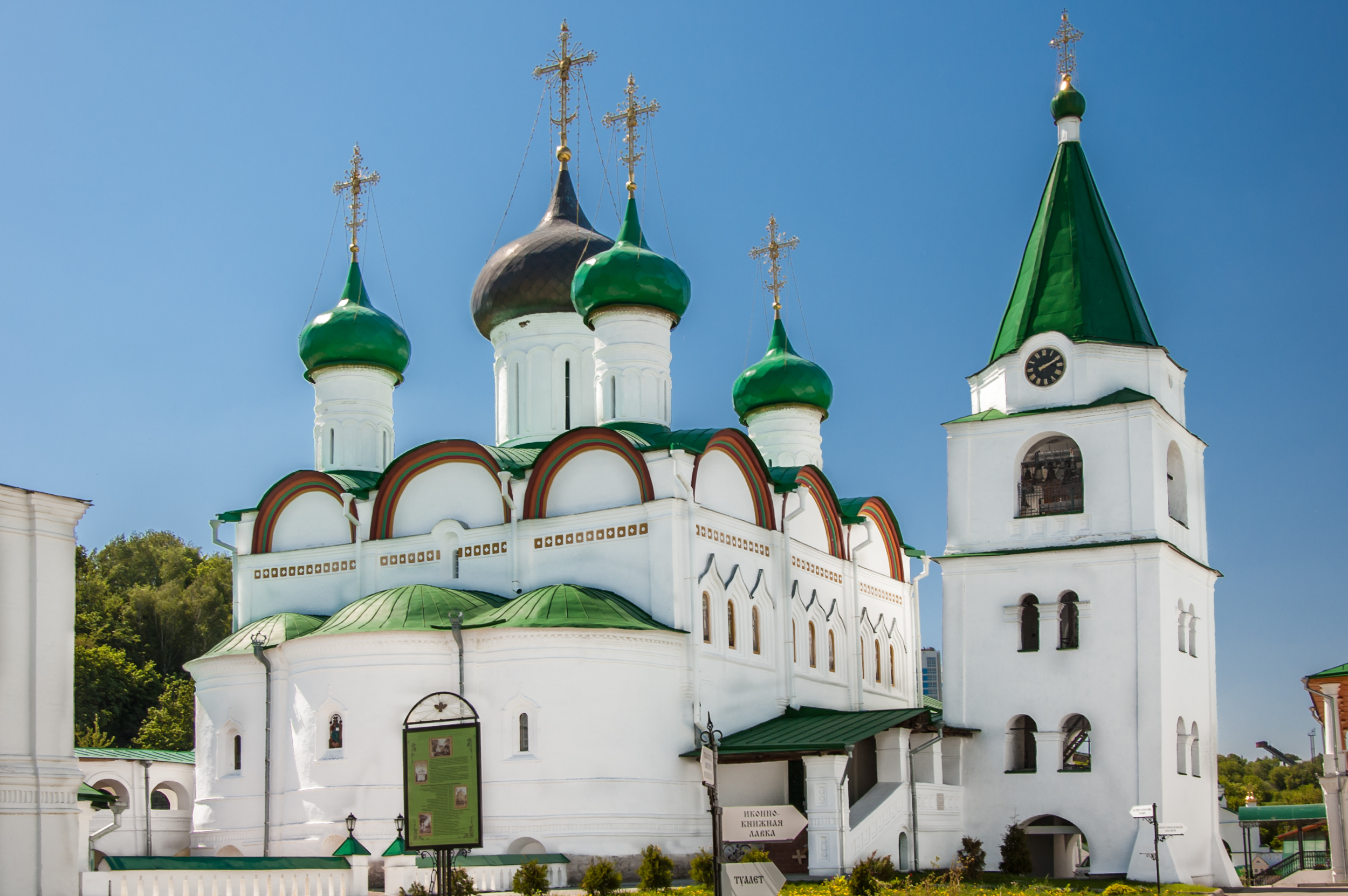 Собор Вознесения Господня: Приволжская слобода, 108, Нижний Новгород, Нижегородская область